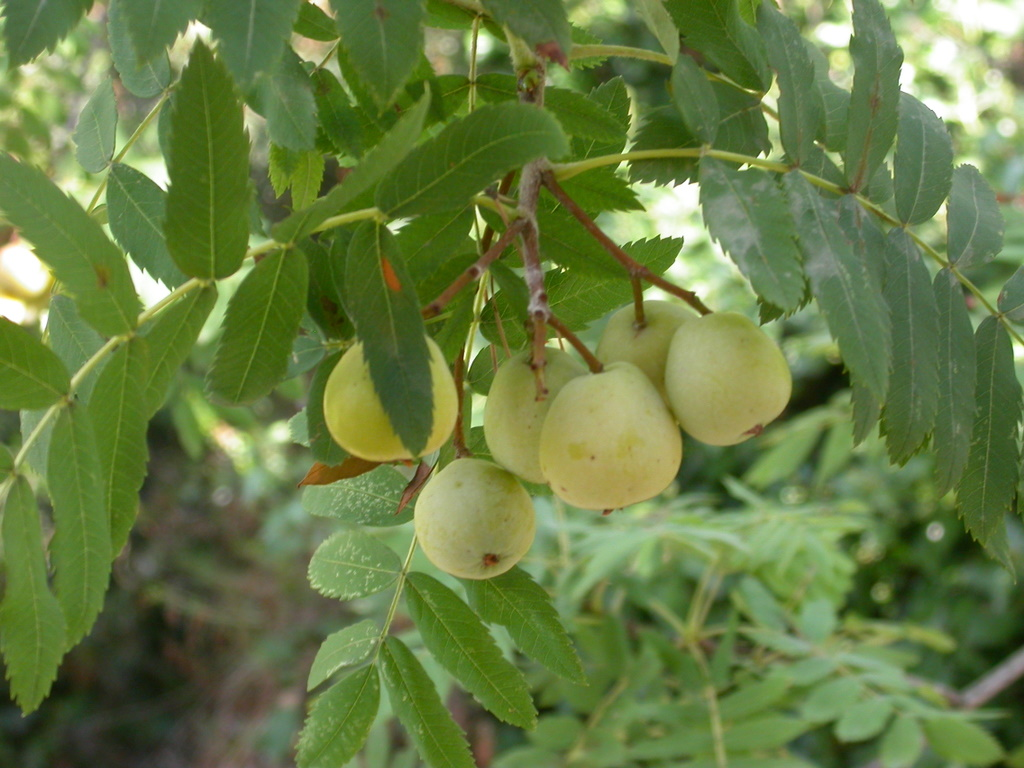 Fruit et feuilles de cormier (Sorbus domestica)